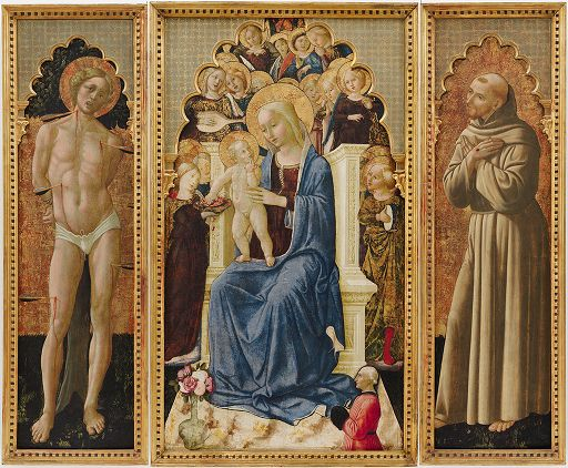 Virgen entronizada entre San Sebastian y San Francisco